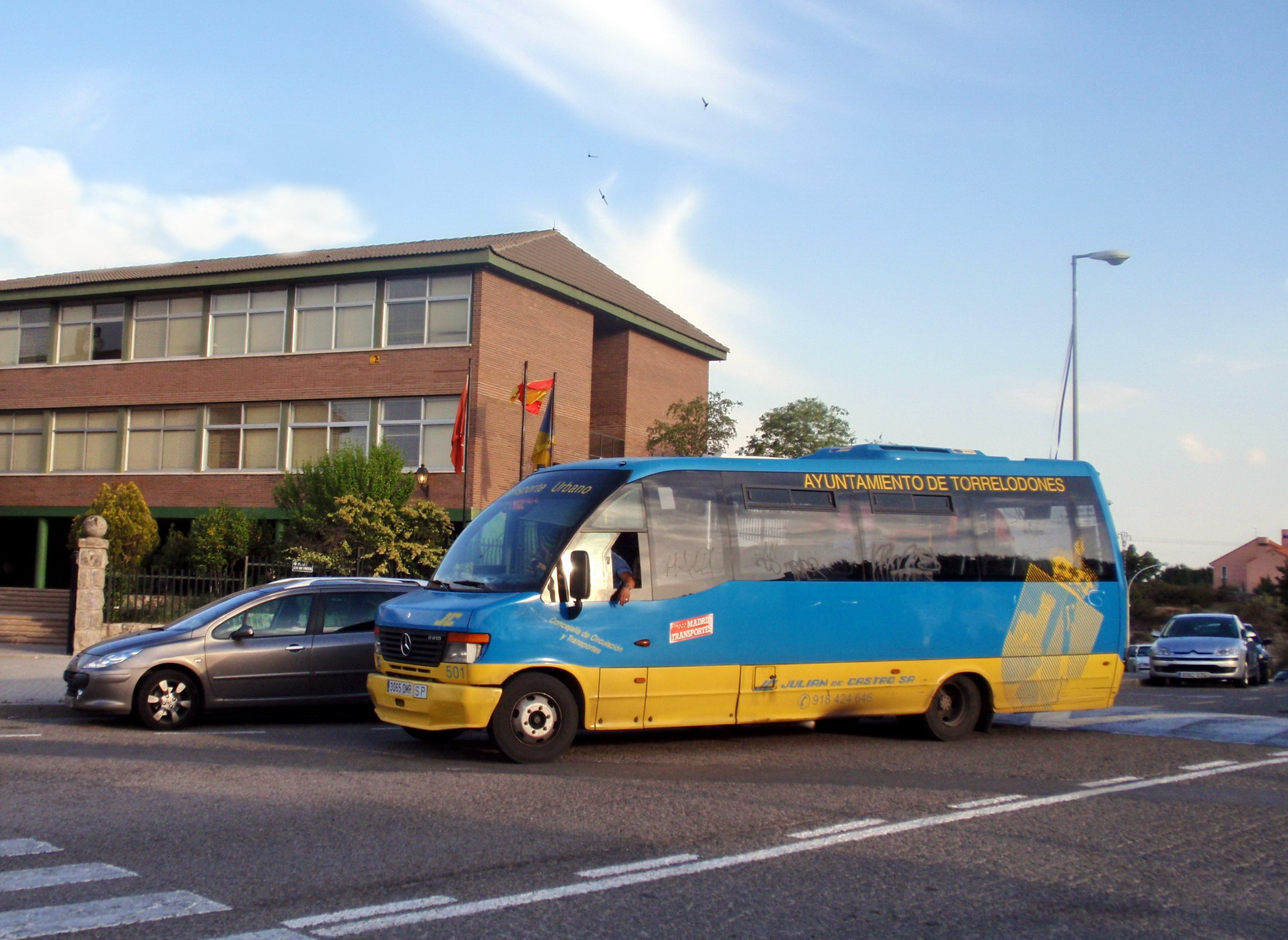 Torrelodones. Transporte público. Autobús urbano.